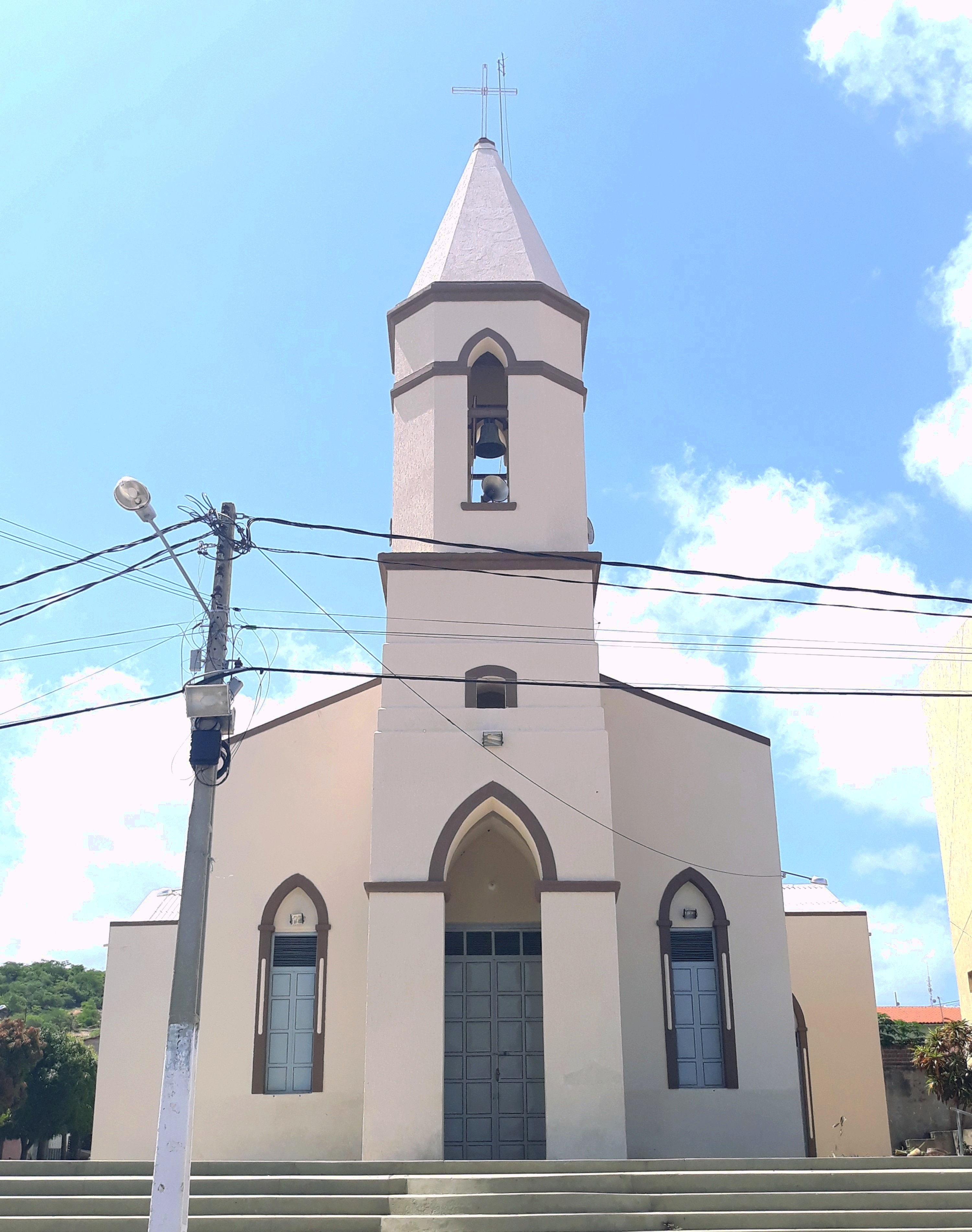 Igreja Matriz de Antônio Martins, Rio Grande do Norte (Brasil), a sede da Área Pastoral Santo Antônio, subordinada à Diocese de Santa Luzia de Mossoró.